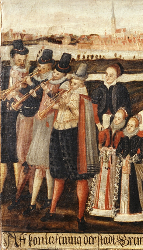 "Ratsmusiker". Detail from a painting "Hochzeitszug", 1618, unknown painter, Focke-Museum Bremen